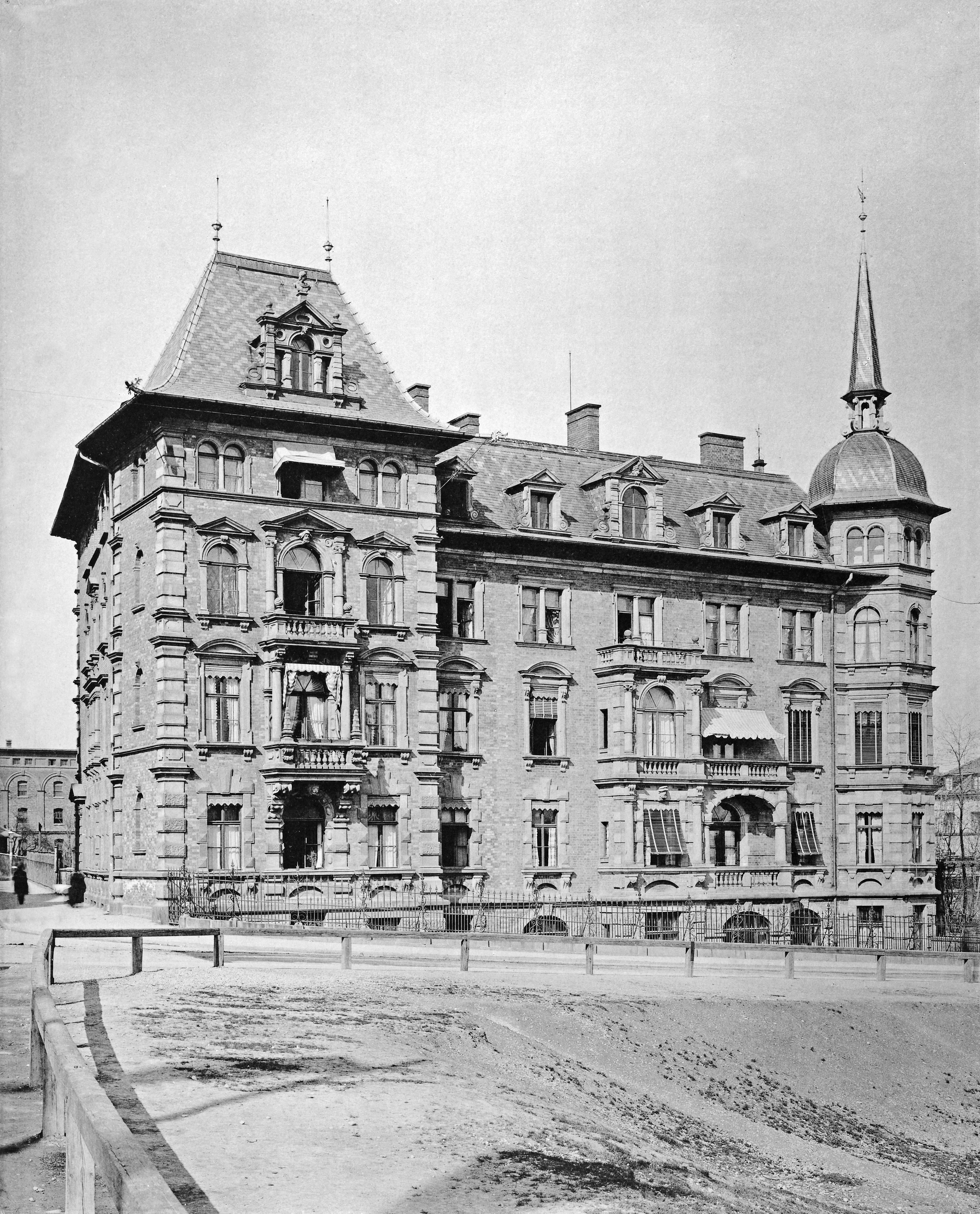 München, Wohnhaus Georg von Hauberrisser um das Jahr 1892.